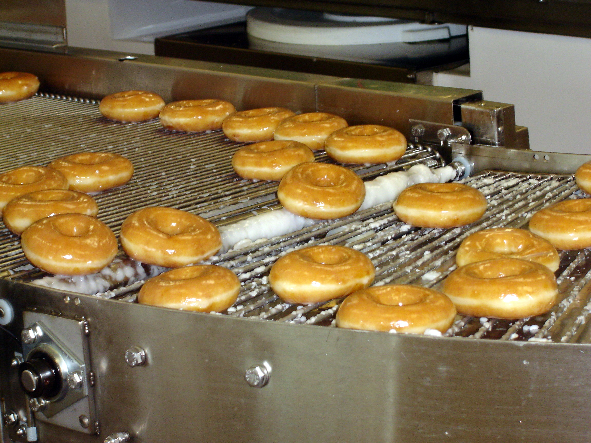 Krispy Kreme doughnuts being made at the Krispy Kreme restaurant at Kingsford Smith Airport, Sydney, Australia.